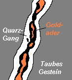 Erzader, schematischer Vertikalschnitt (vereinfacht nach Schwegler/ Geologie, S. 26). Das Ganggestein (weiß für Quarz) wurde ebenso wie der Erzgang aus aufsteigenden Dämpfen oder heißen Wässern ausgeschieden.